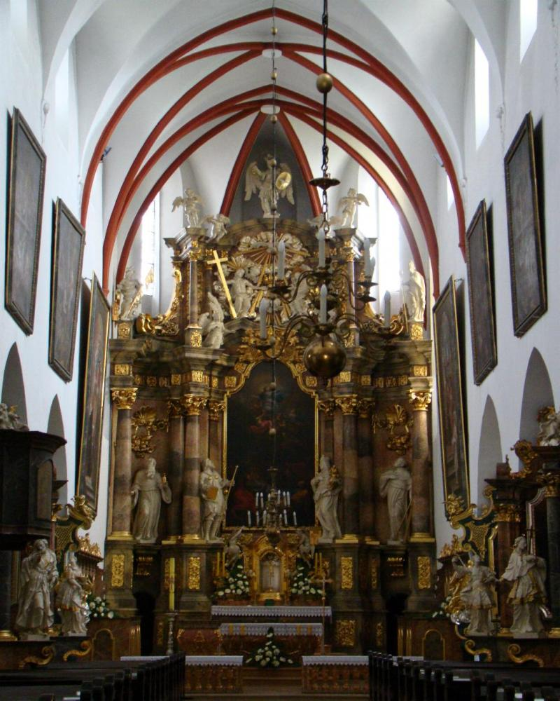 Jemielnica